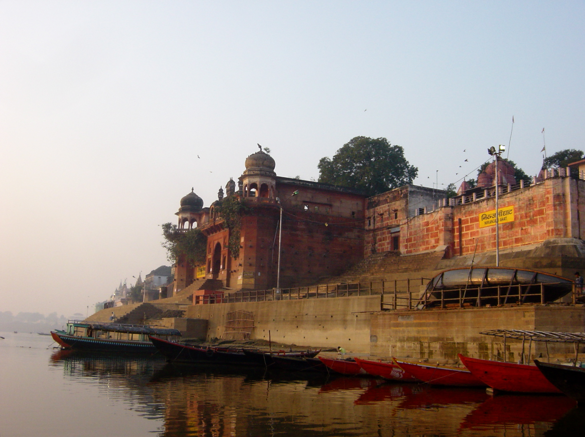 Varanasi